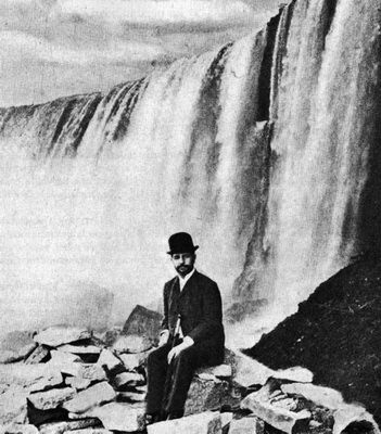 Pedro Montt en las cataratas del Niagara